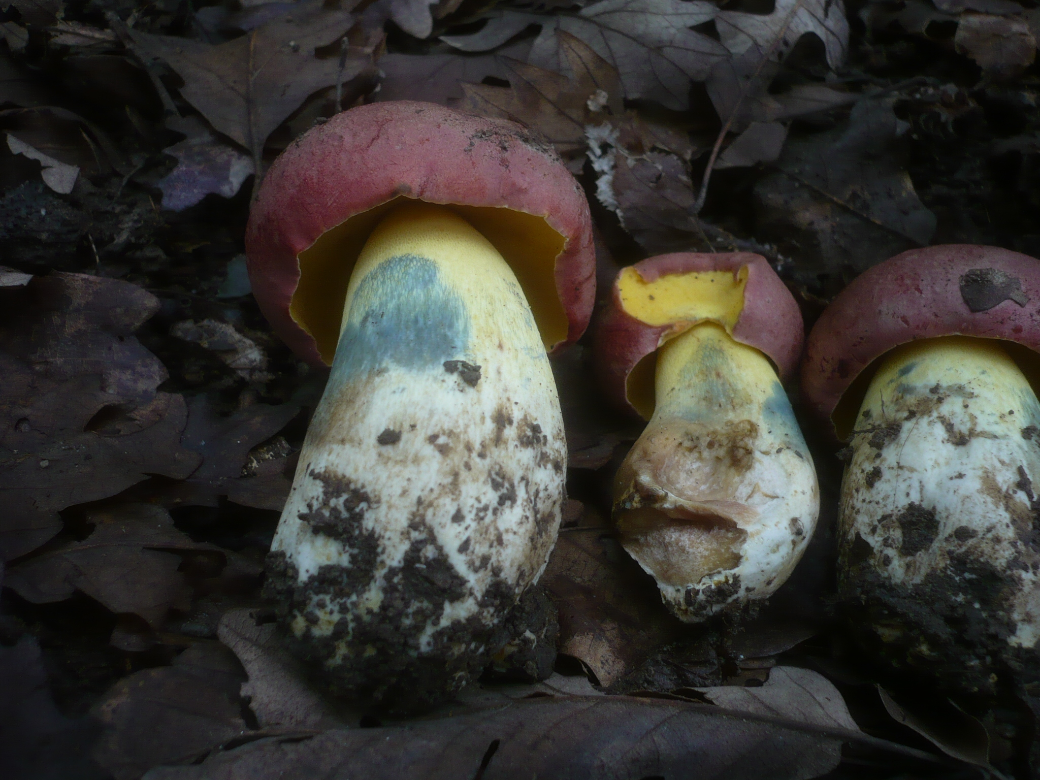 Boletus fuscoroseus Smotlacha